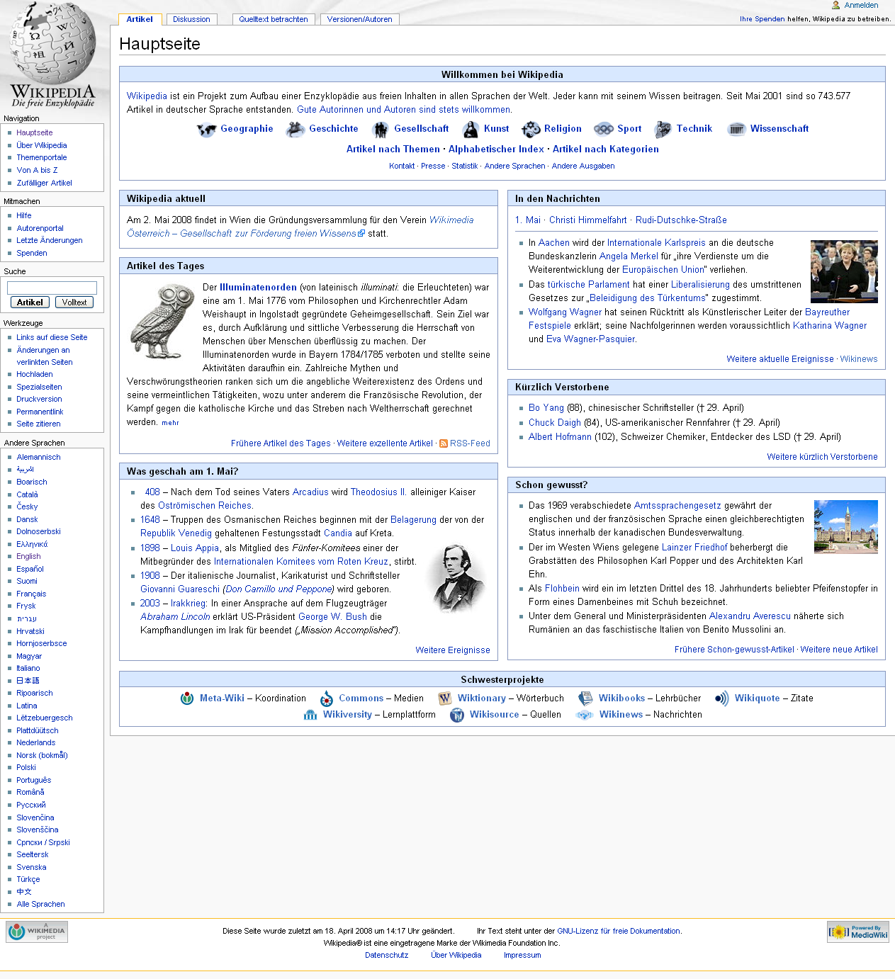 German Wikipedia Main Page